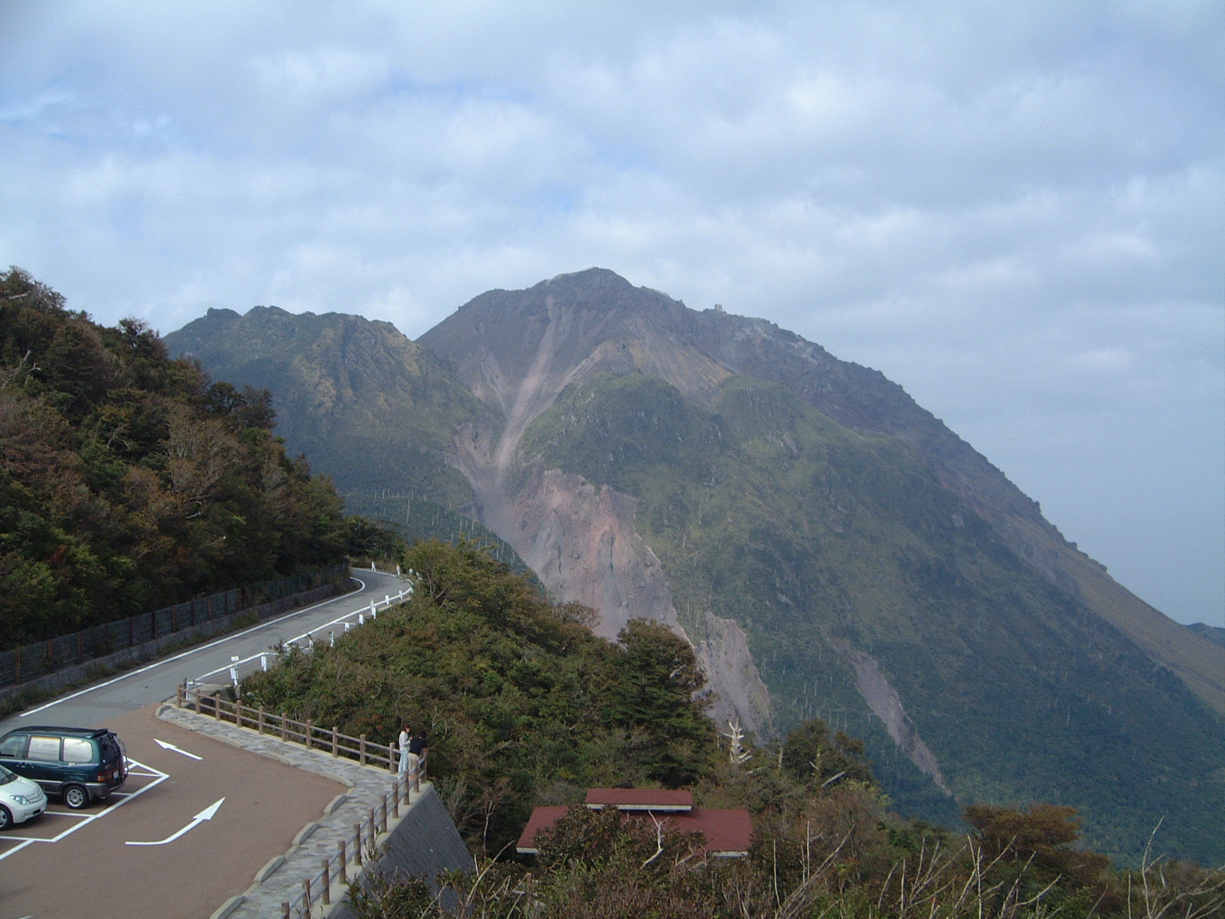 Mt. Fugen and Mt. Heiseishinzan Unzen,Japan